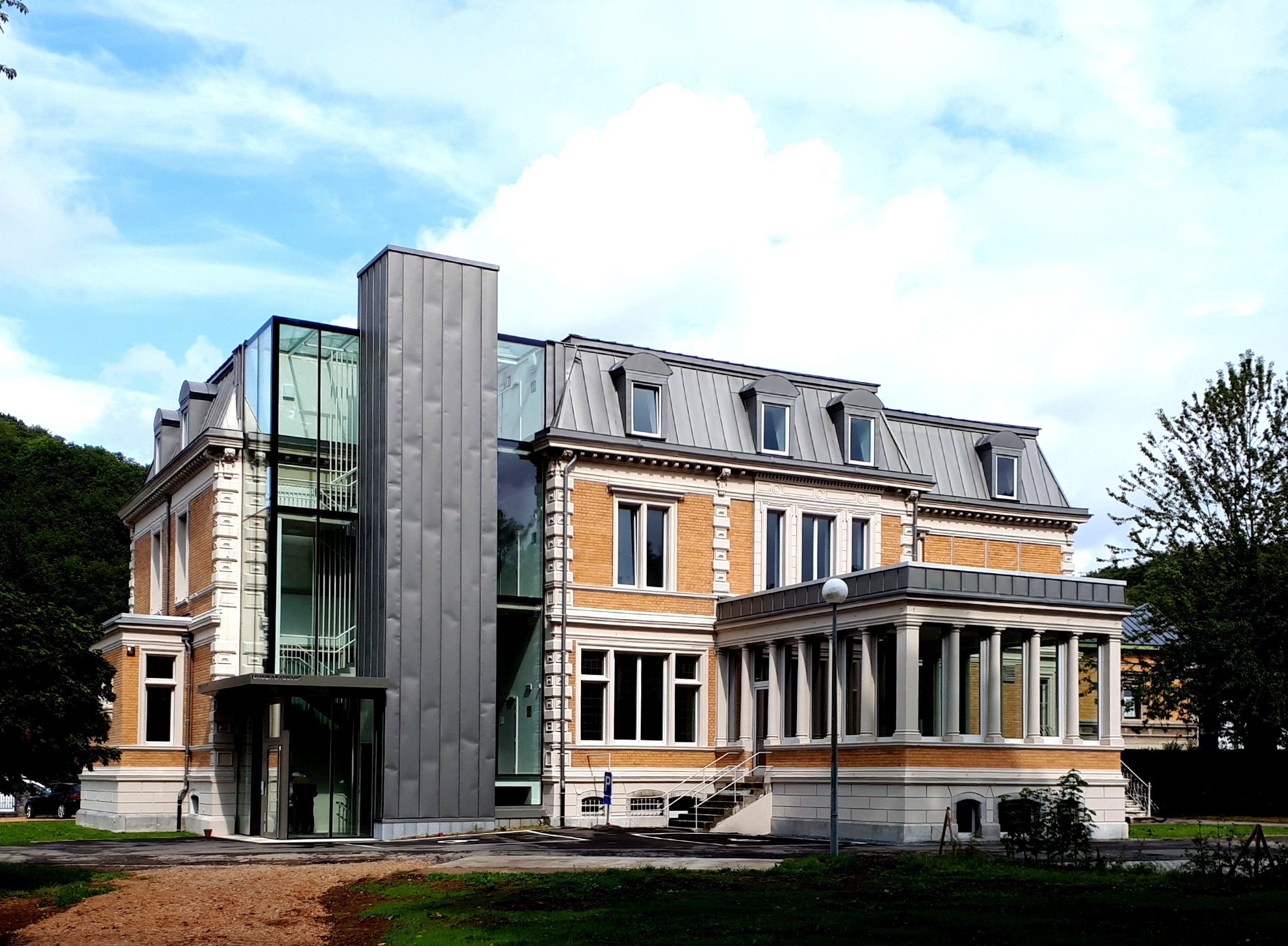 Villa Arthur Peters in Eupen, heute Musikakademie, Außenansicht von Süden